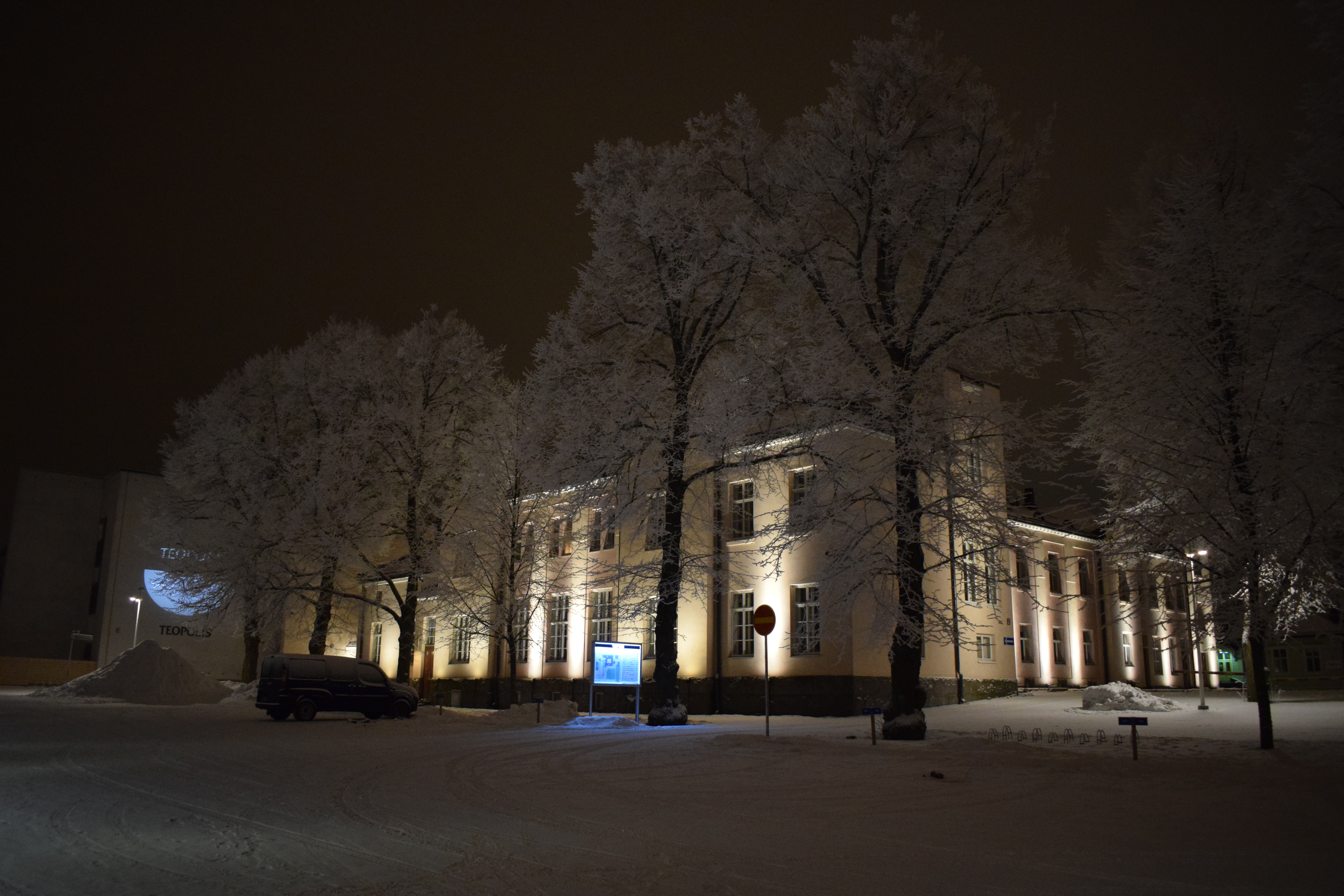 Teopolis iltavalaistuksessa 11.1.2018